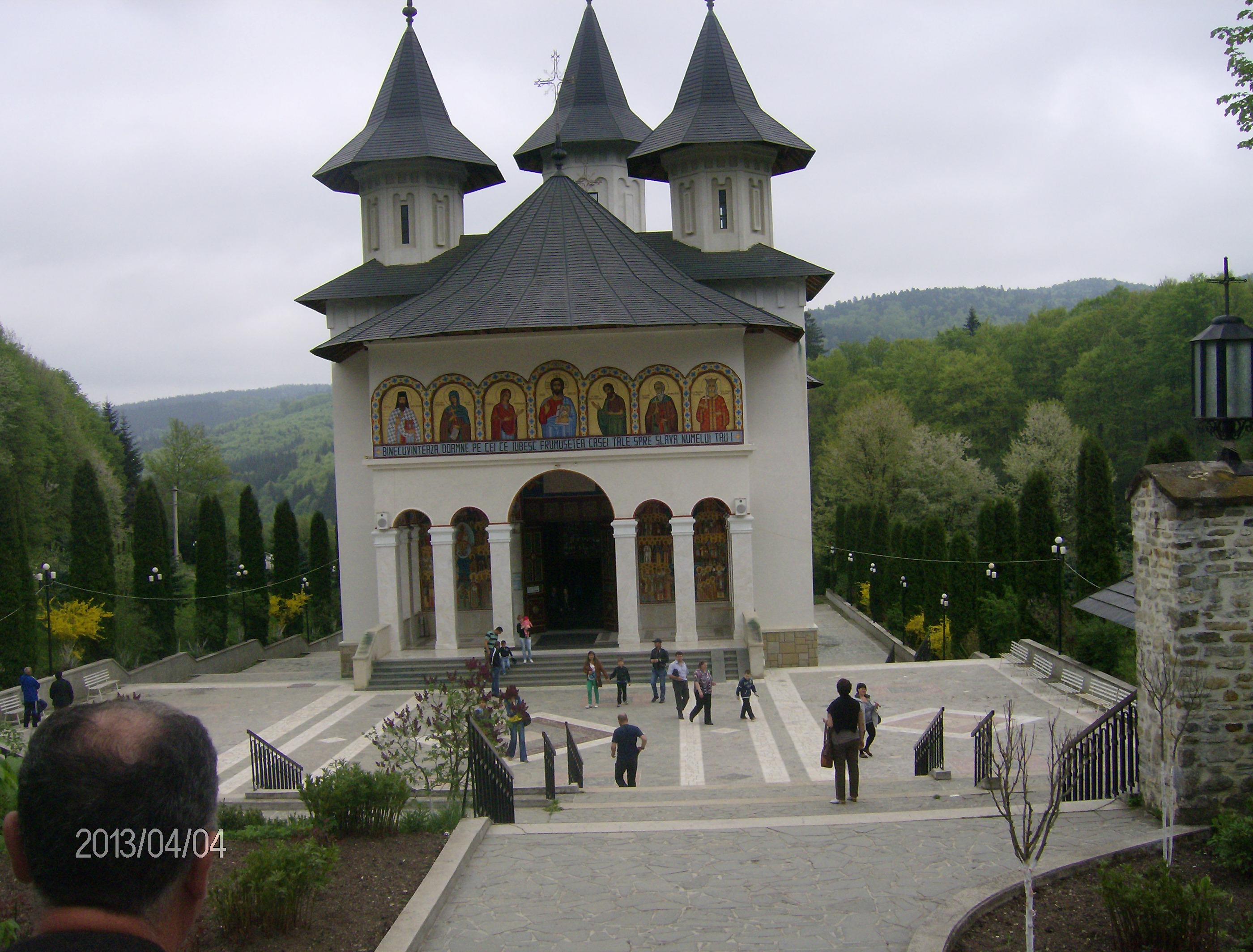 Biserica nouă a mânăstirii Sihăstria, sfinţită în 2007